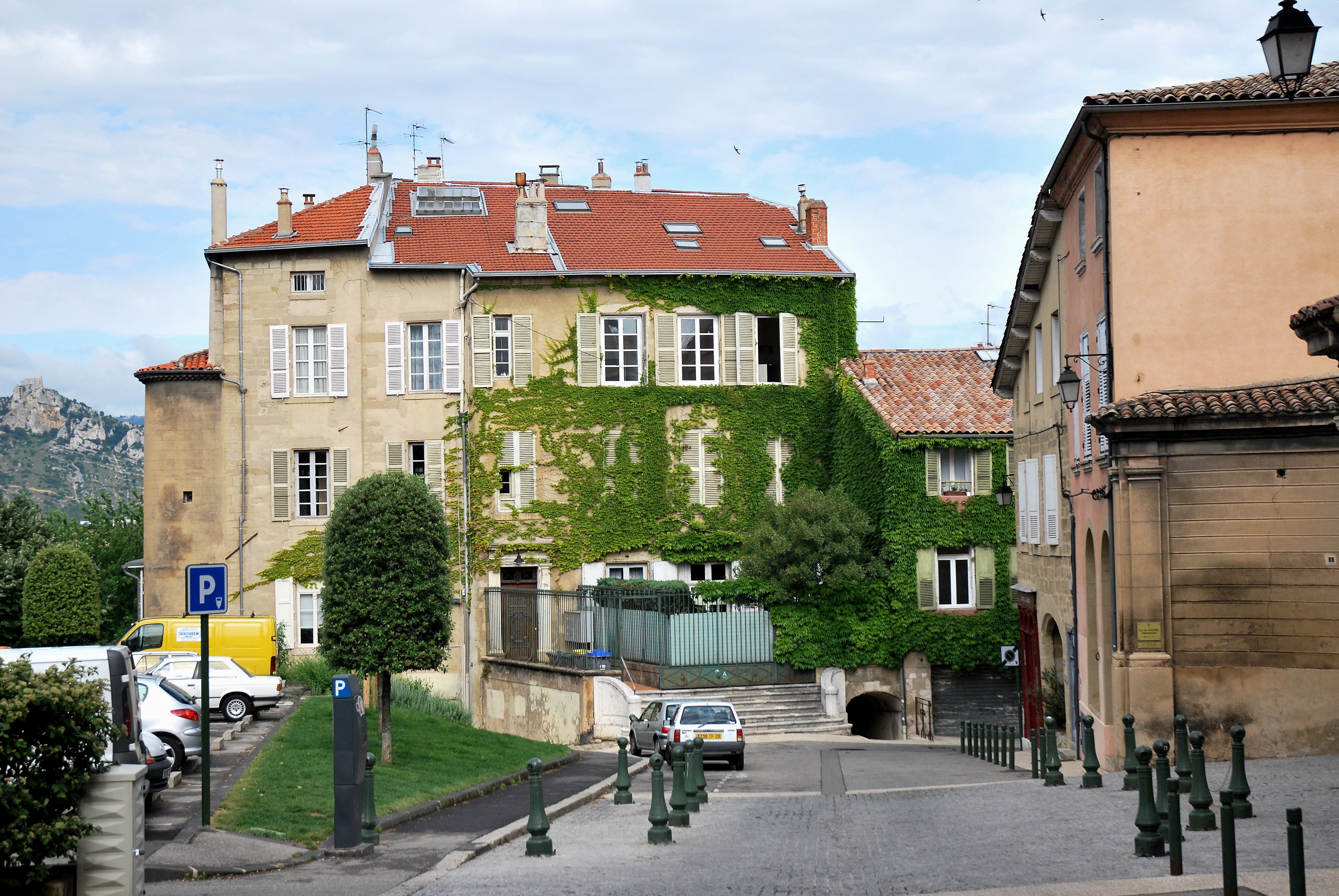 côtes des chapeliers